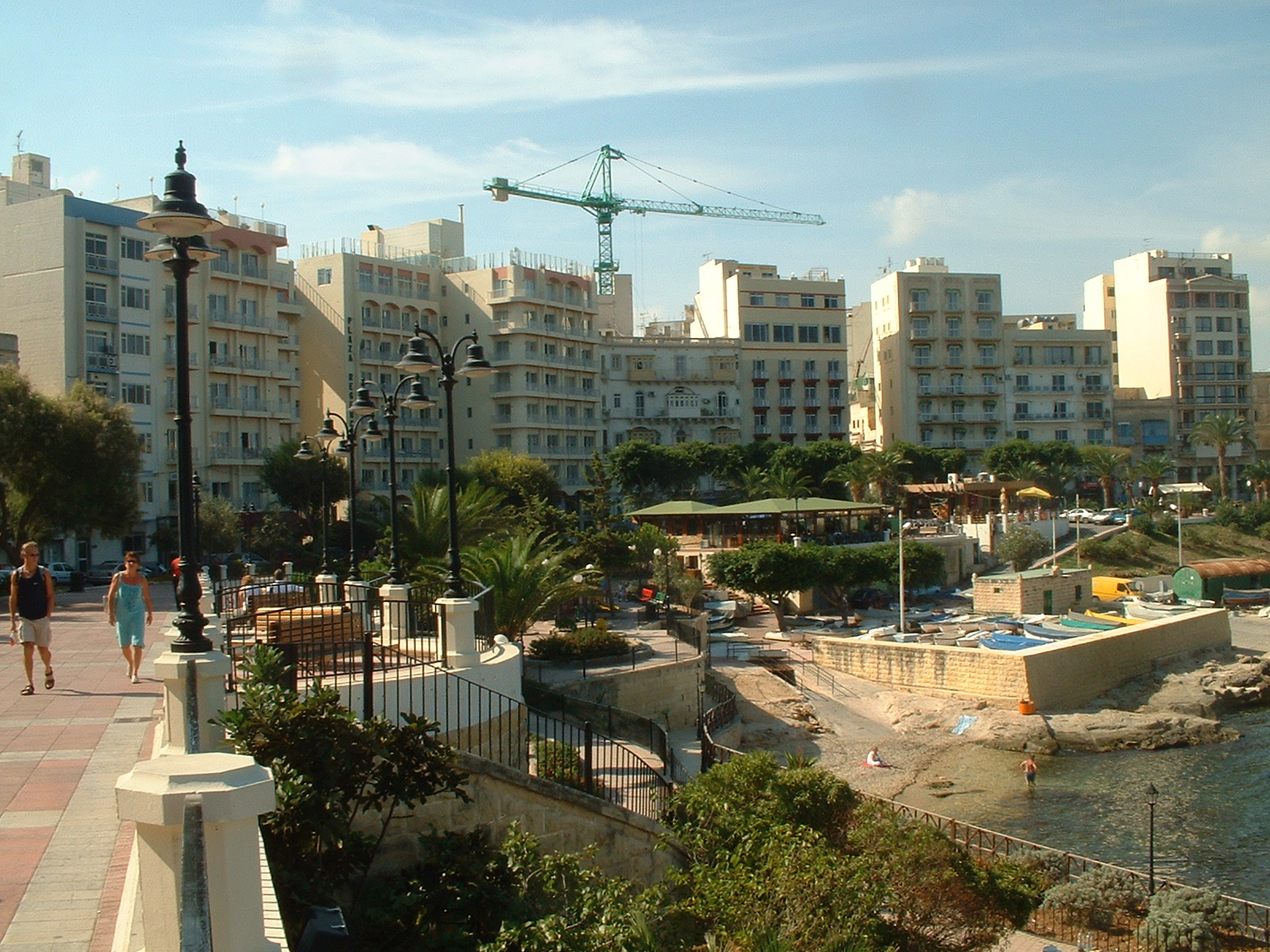 Eine Häuserfront von Aparmentblocks in Sliema, Malta